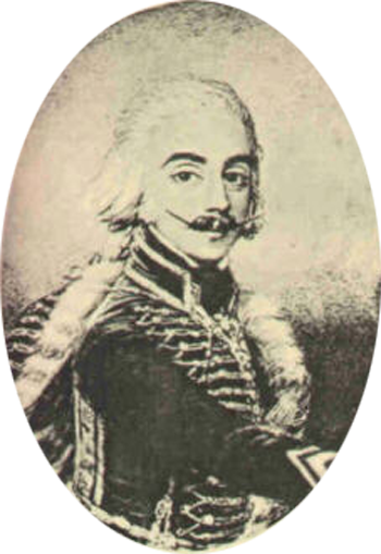 Portrait du général Charles de Frégeville, alors colonel (1792)